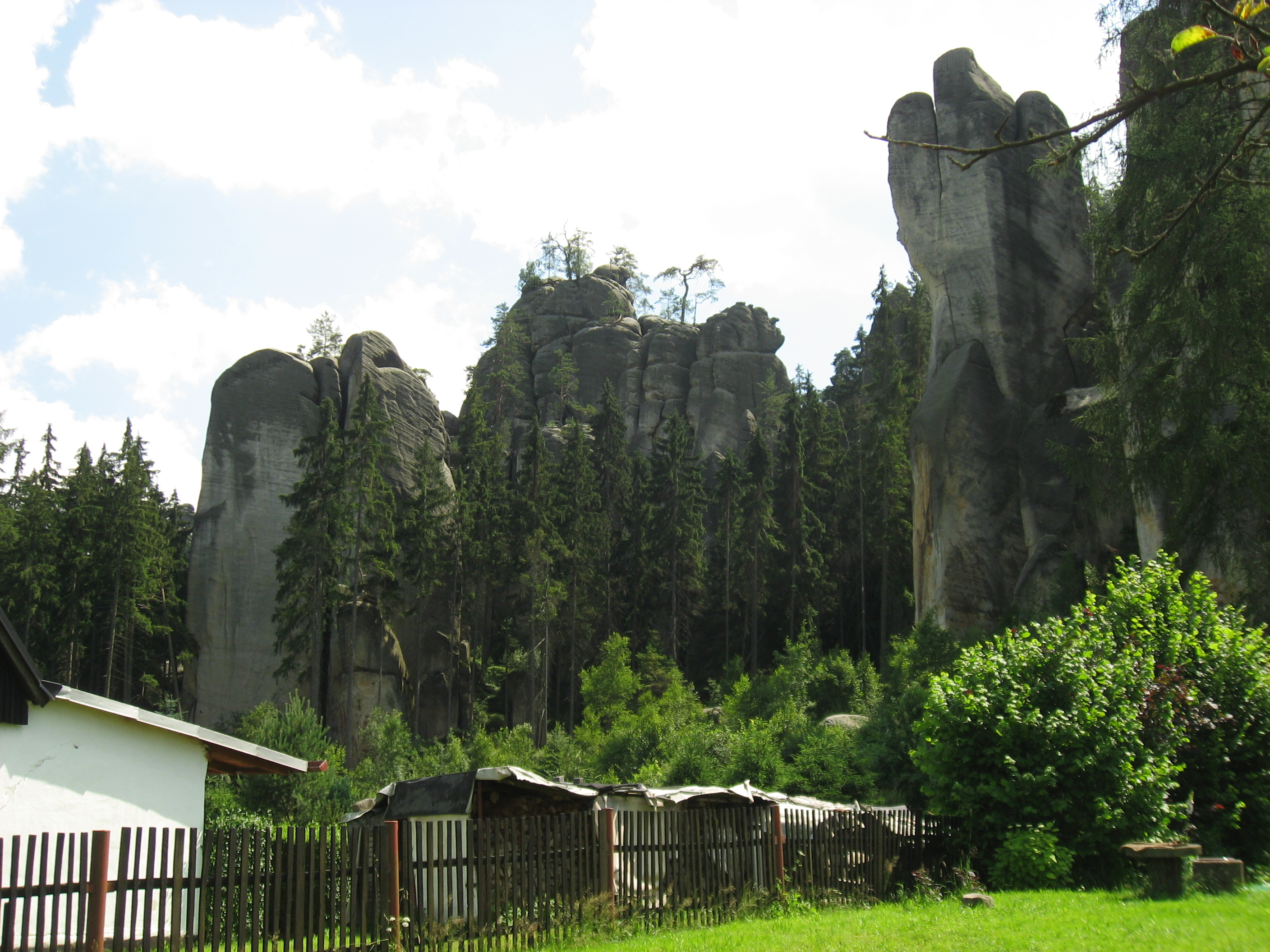 Adršpašskoteplické skály